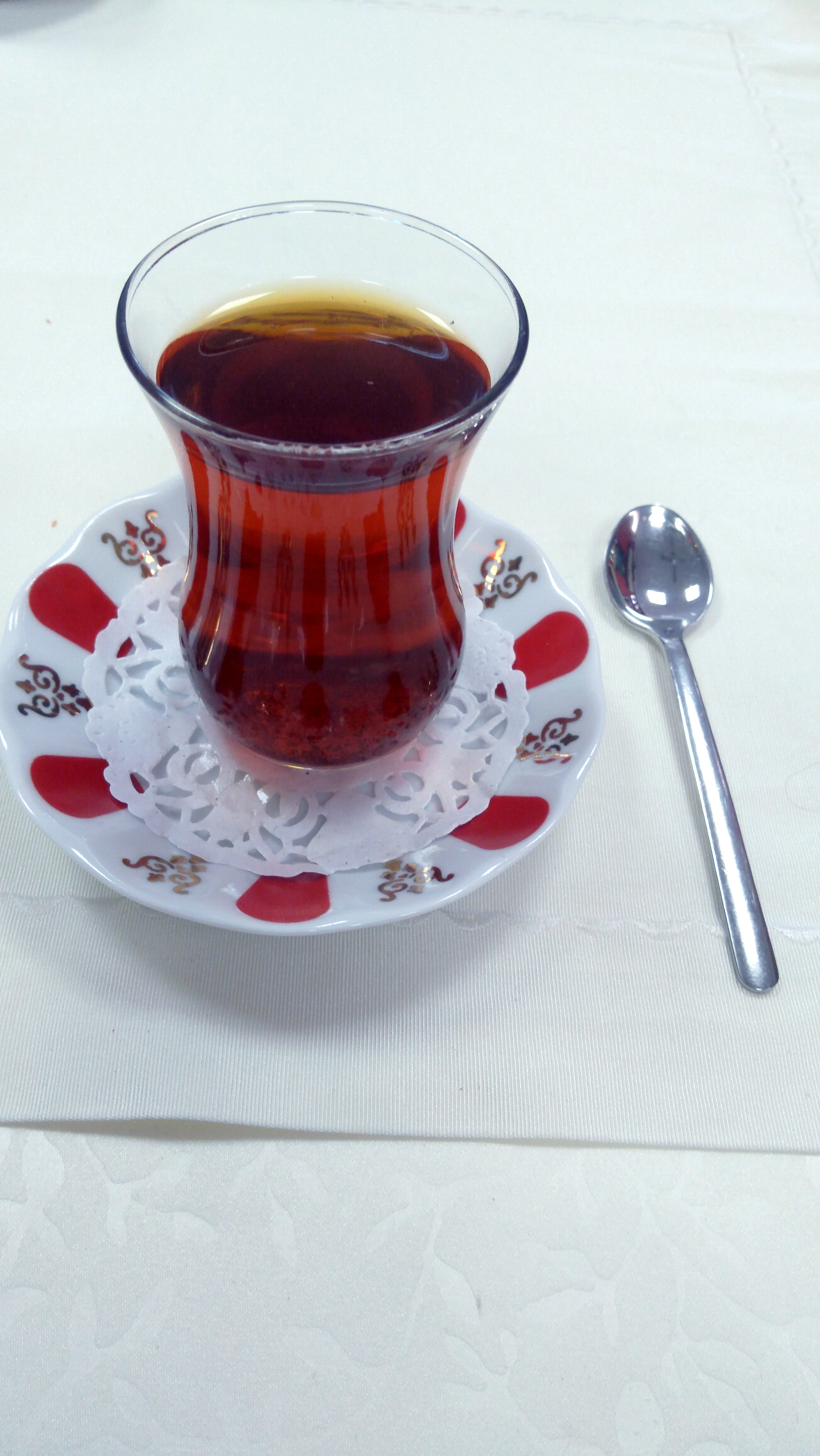 Turkish tea, at a restaurant at Ankara, Turkey